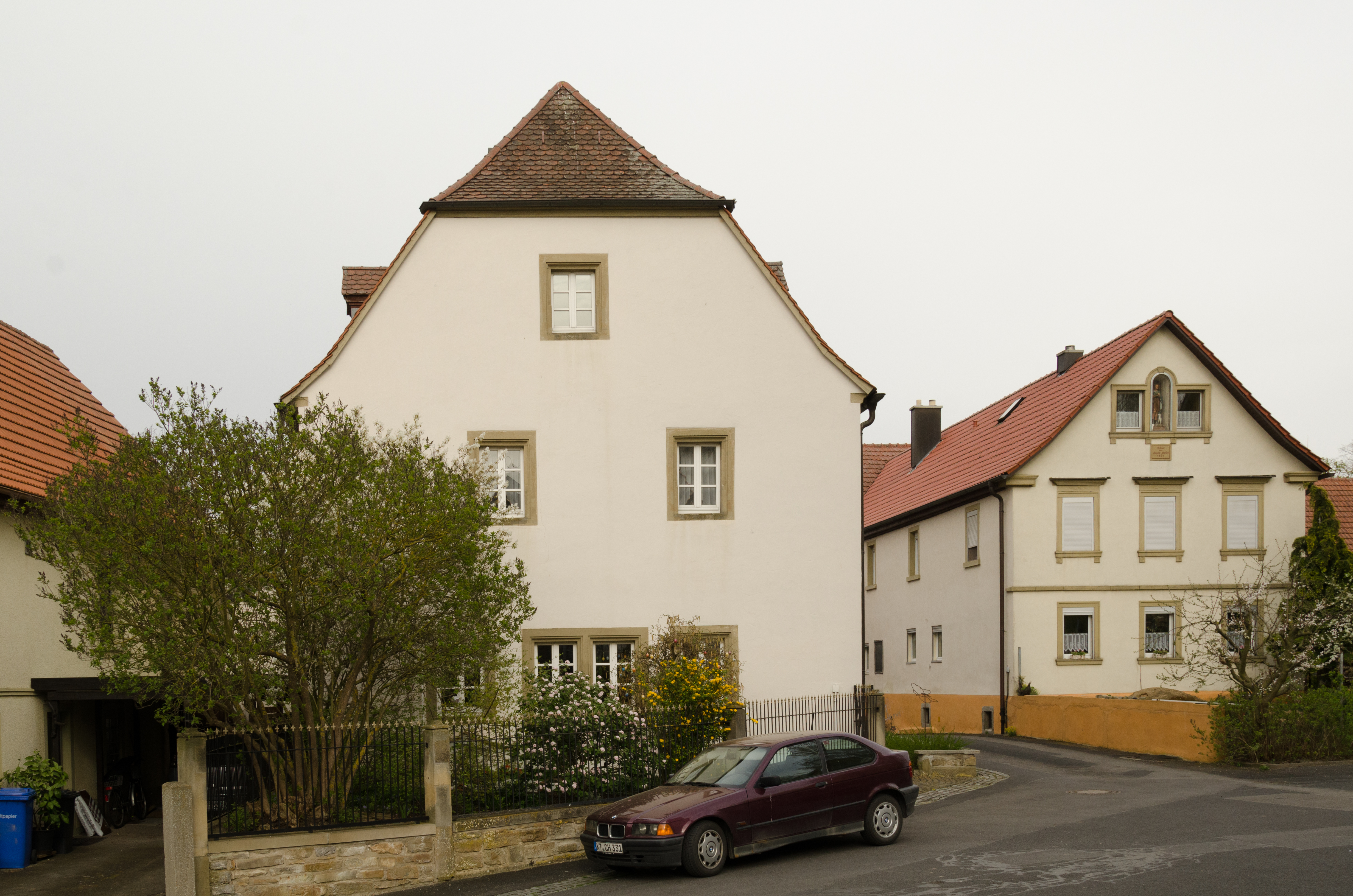 Bergtheim, Dipbach, Kirchplatz 5